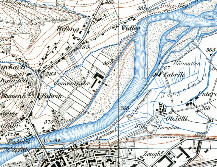 Darstellung des Kraftwerk der Zementfabrik Zurlinden & Co. im Rüchlig und des Kraftwerks der Chocolat Freqy A.G auf der Siegfriedkarte. Datenstand 1896